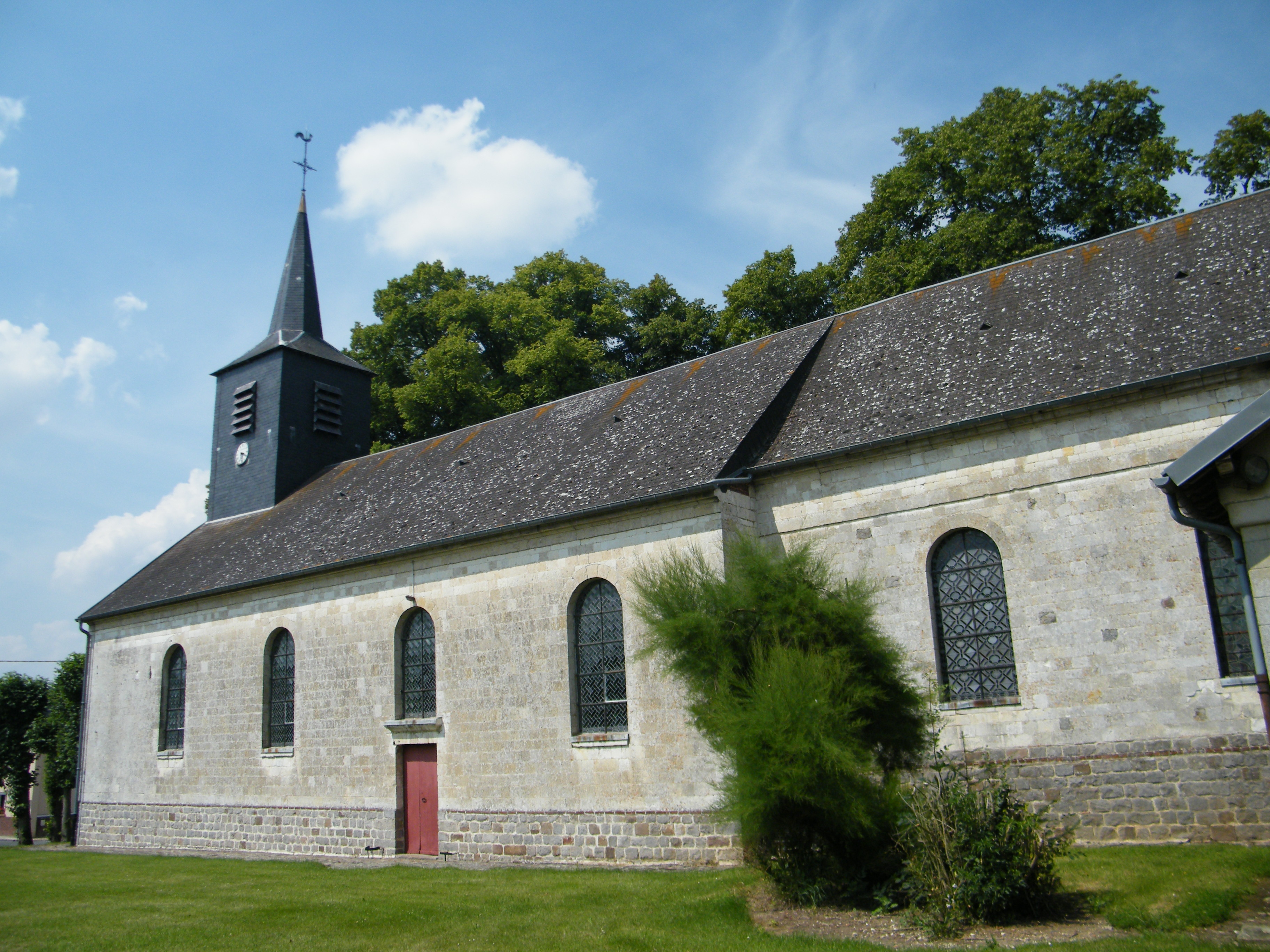 église.